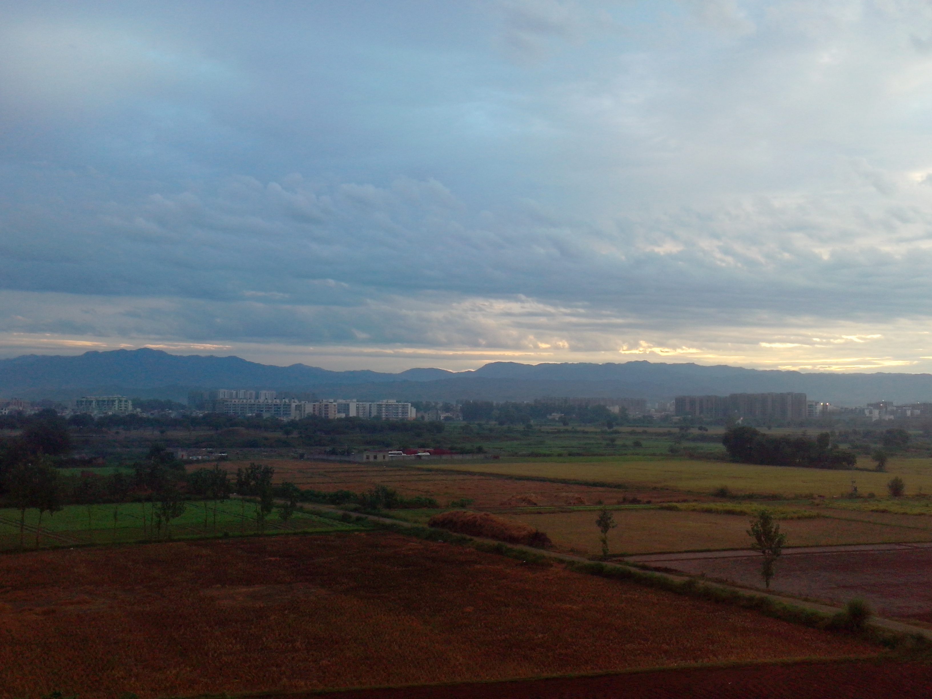 Dhakoli area, Zirakpur